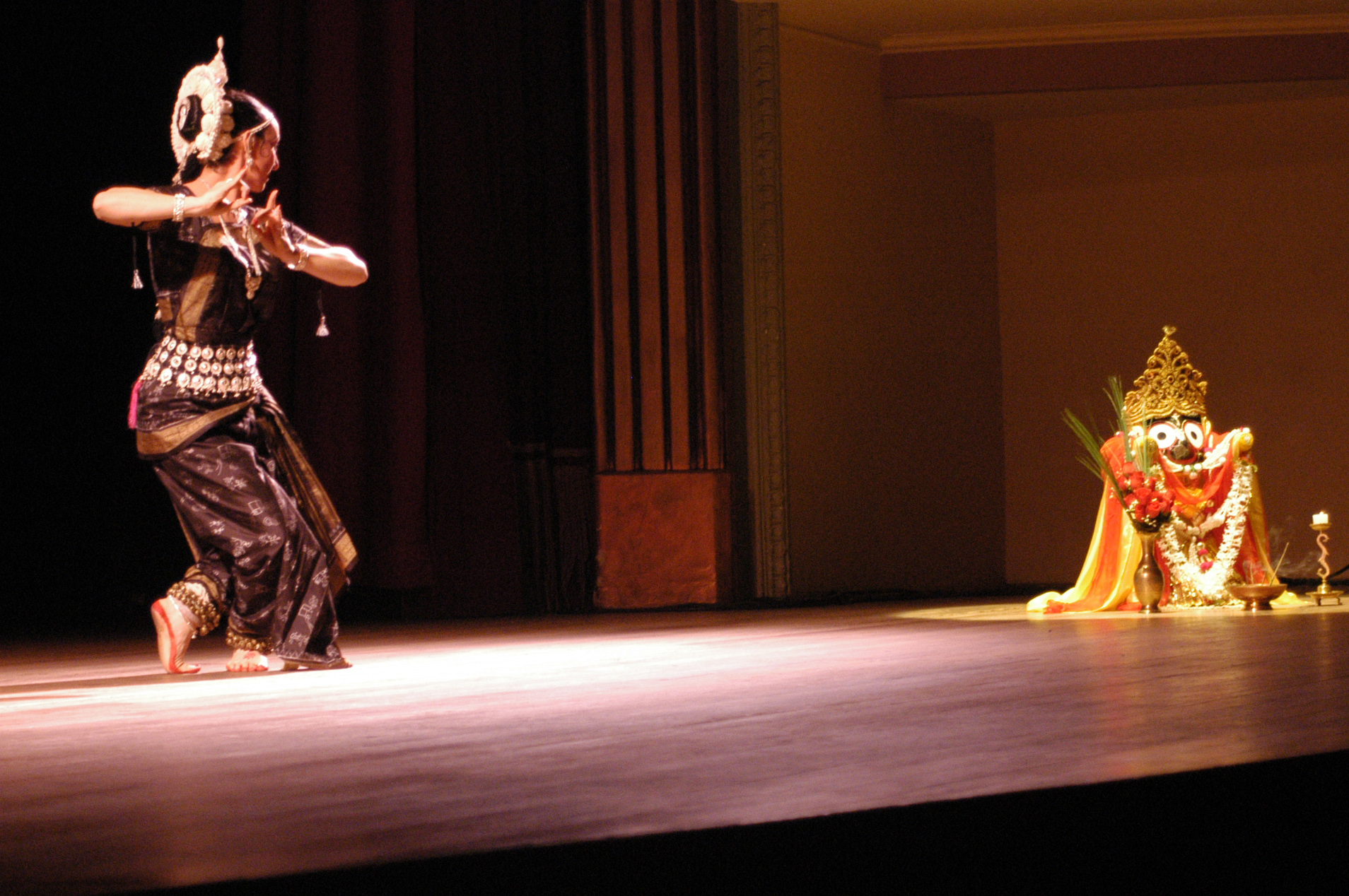 A Bailarina de Odissi Bhávana Rhya, dança para Jaganatha